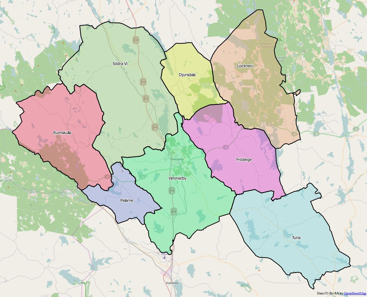 Distriktsindelningen i Vimmerby kommun World file 85.55262598760229764 0 0 -85.55262598760229764 1713048.83515074173919857 7944136.71814392507076263